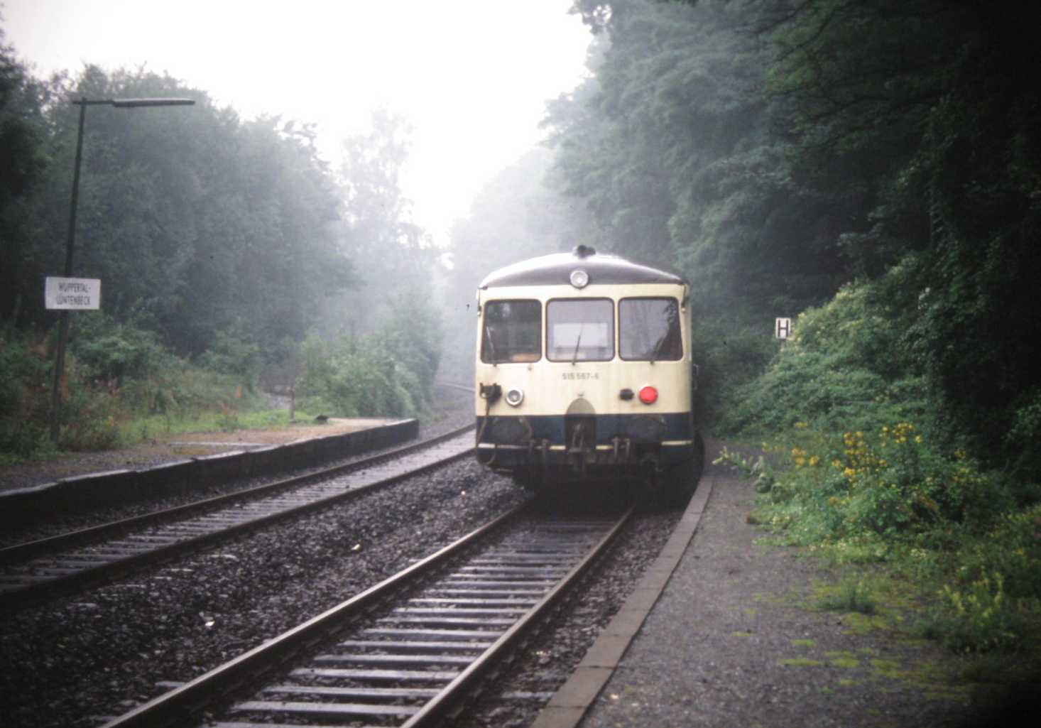 DB-Akkutriebwagen Baureihe 515 + Beiwagen im Sommer 1989 am Haltepunkt Wuppertal-Lüntenbeck auf der Verbindungskurve von der Wuppertaler Nordbahn nach W-Vohwinkel. Film-Nr 106